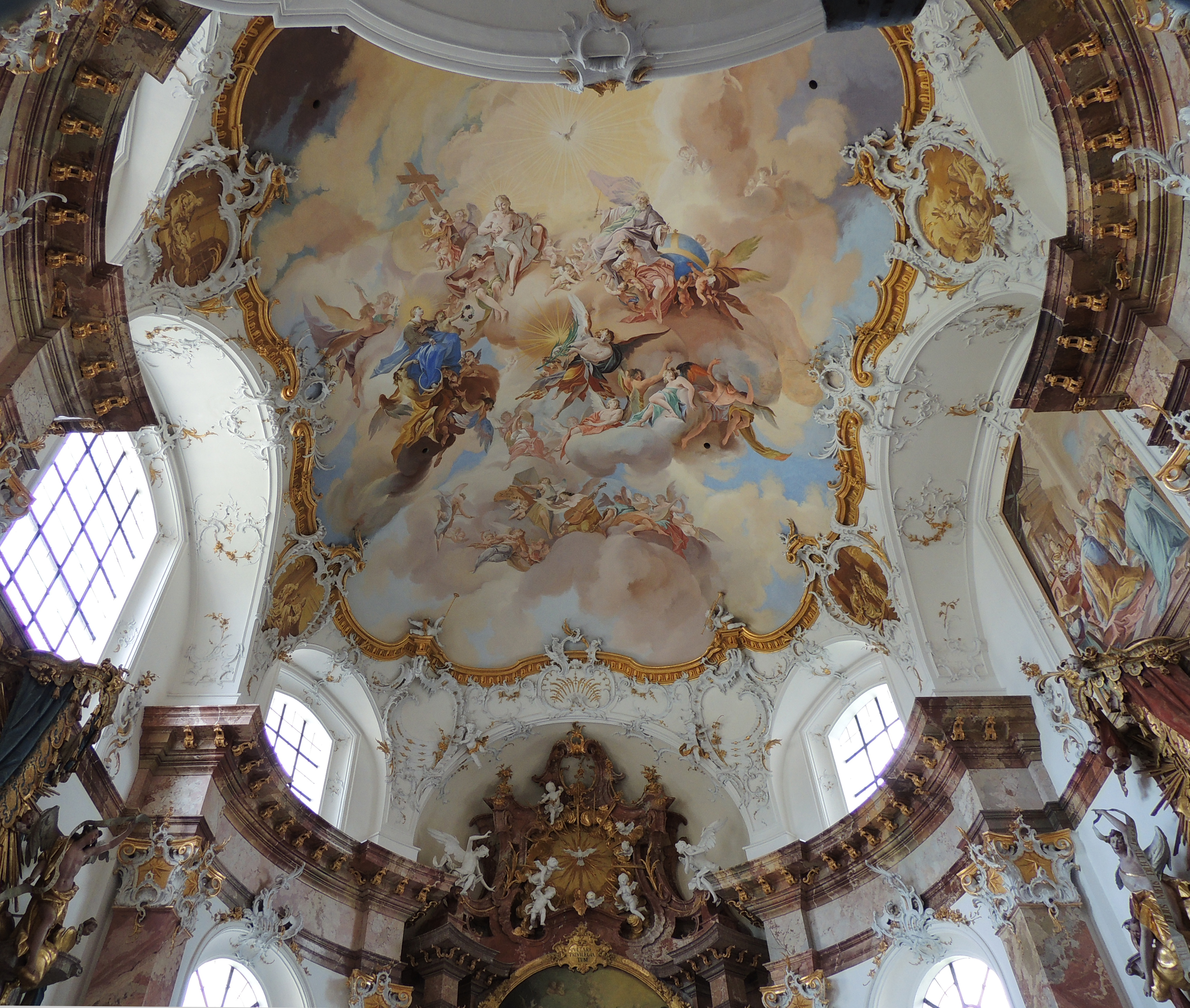 Fresko von Johann Jakob Zeiller in der Anastasiakapelle des Klosters Benediktbeuern